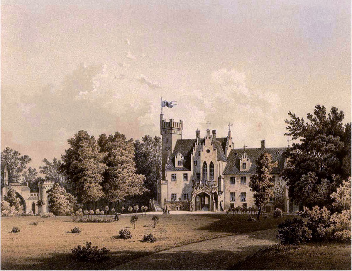 Schloss Stabelwitz, Kreis Breslau